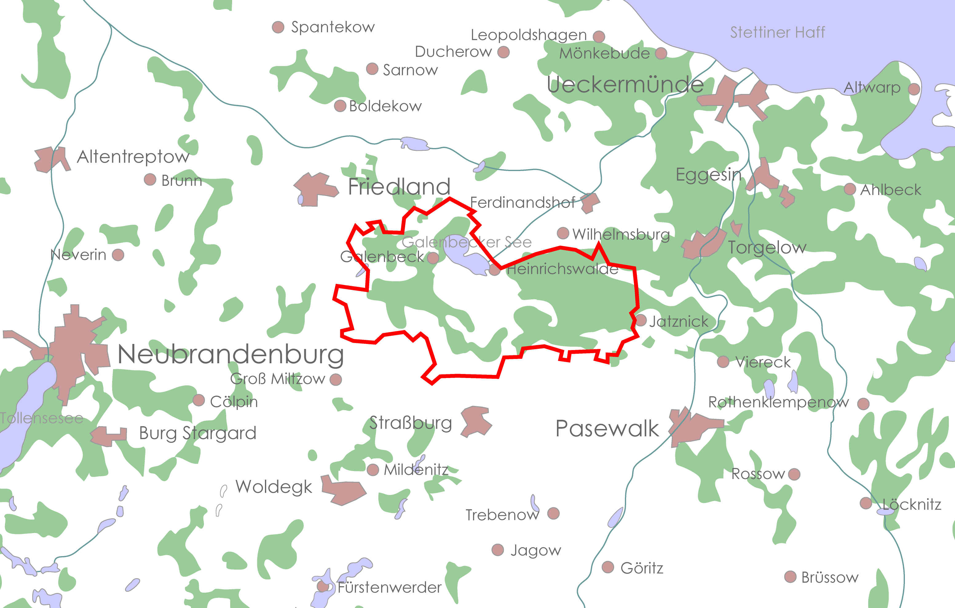 Größe und Lage des LSG Brohmer Berge in Mecklenburg Vorpommern